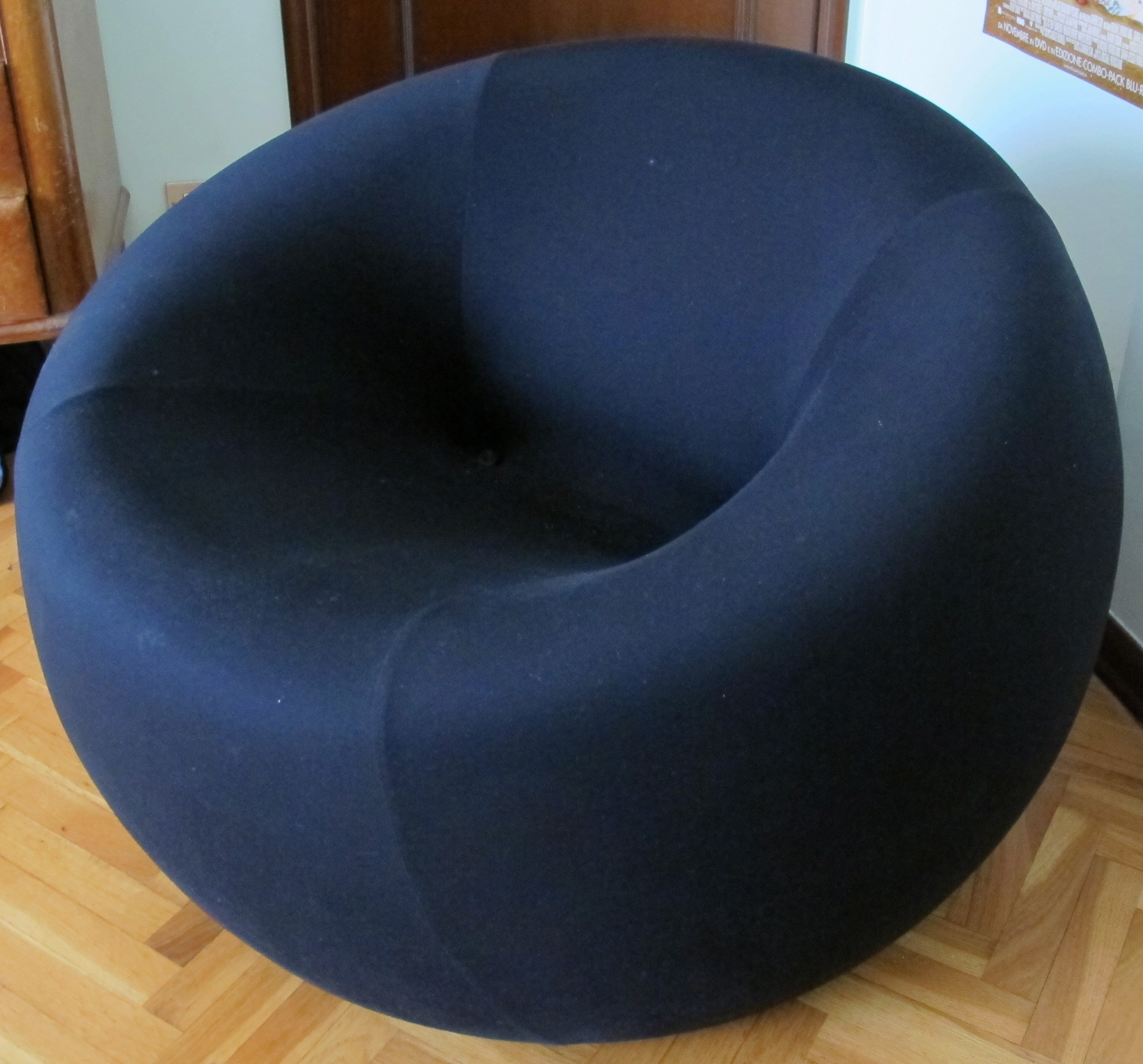 Gaetano pesce, up chair